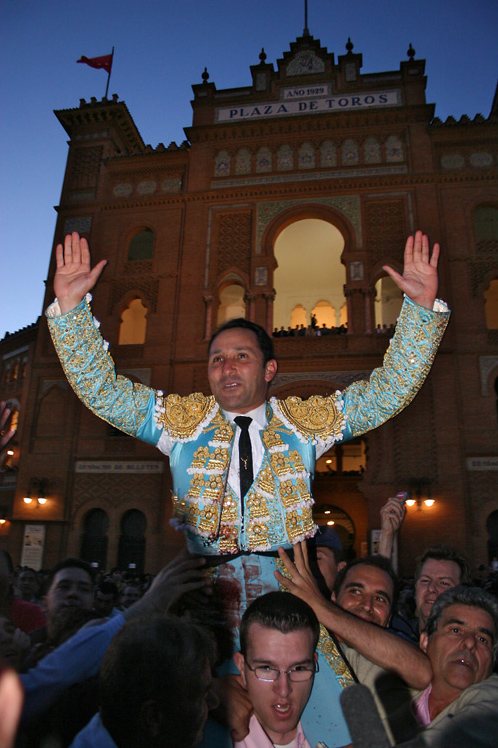 La última Puerta del César